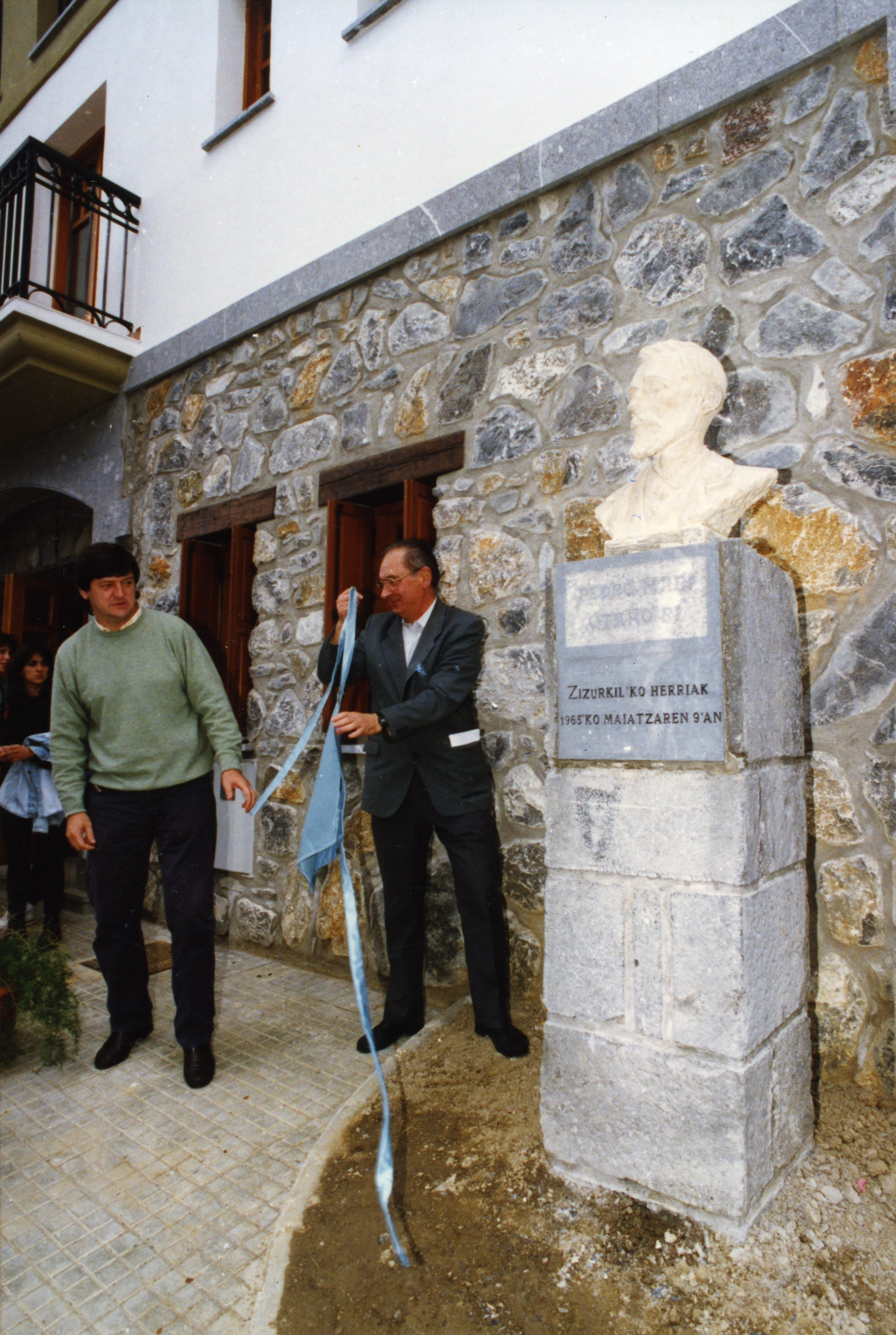 Pello Mari Otaño eta Teodoro Hernandorena bertsolariei omena.Mikel Arrastoa Zizurkilgo alkatea eta Antonio Zabala ikerlaria. Aiurri 2 zbk. 24. orr.